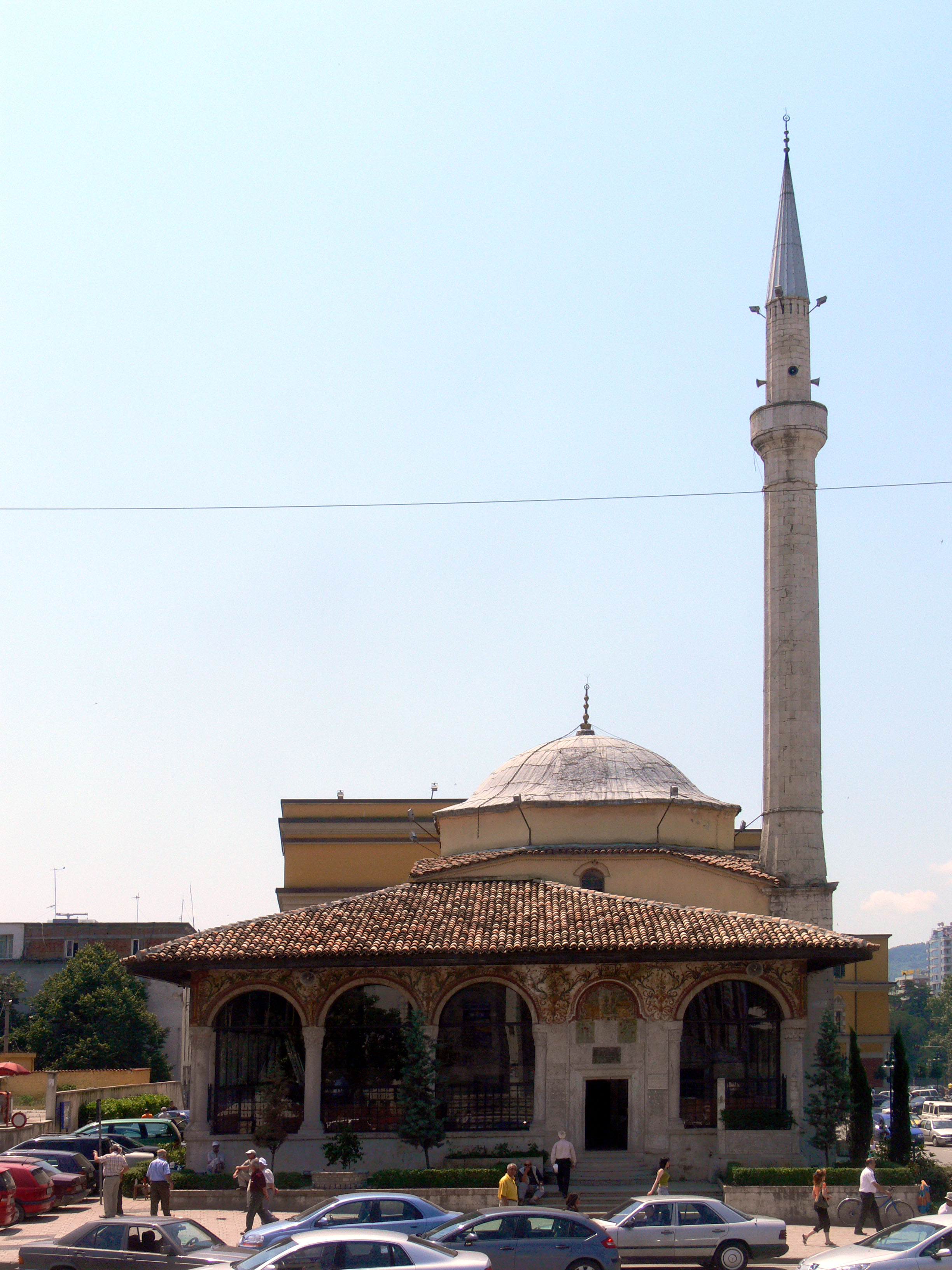 Tirana. Et'hem Beu-Mosque.